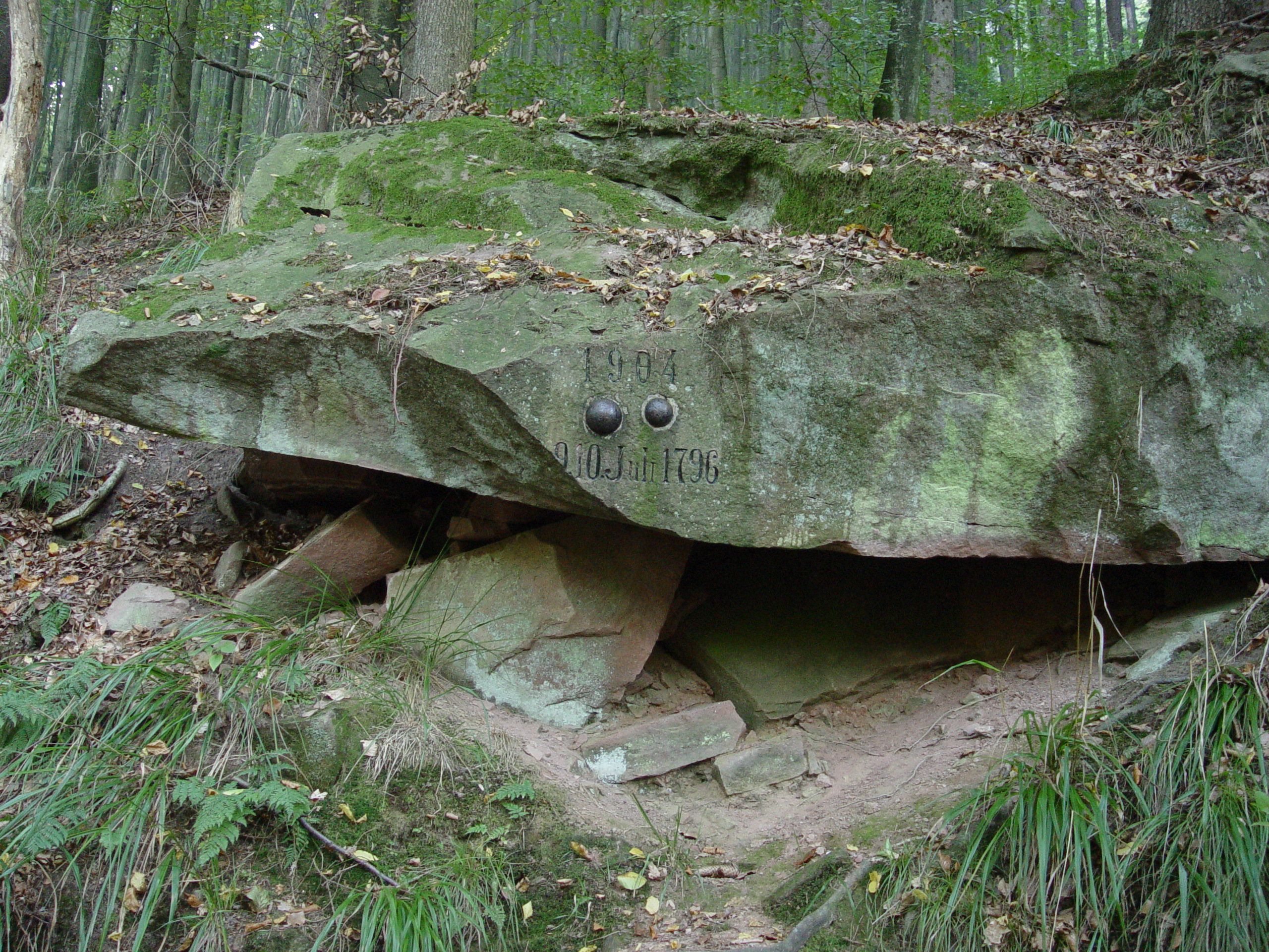 Fotografiert von Martin Dürrschnabel. Koalitionskrieg 1796-1797. Nach der Schlacht bei Malsch, gegen die Franzosen unter General Jean Victor Moreau, zog Erzherzog Karl mit den österreichischen Truppen am 9. und 10. Juli 1796 durch das Albtal. Aus diesen Tagen stammen die im Fels bei Frauenalb eingelassenen Kanonenkugeln.